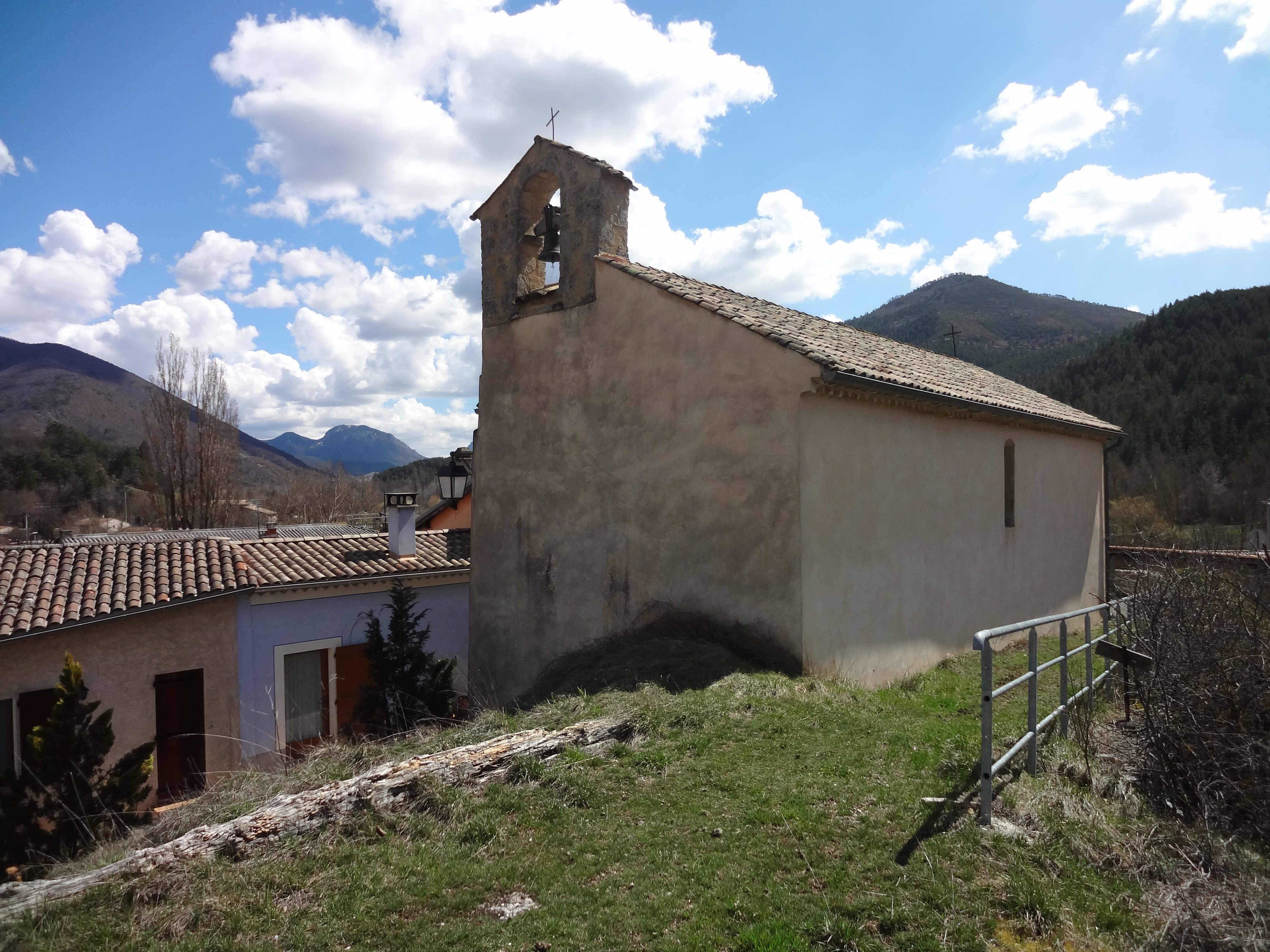 Située à la sortie ouest du village, sur l’ancien chemin, emprunté par Napoléon lors des Cent-Jours